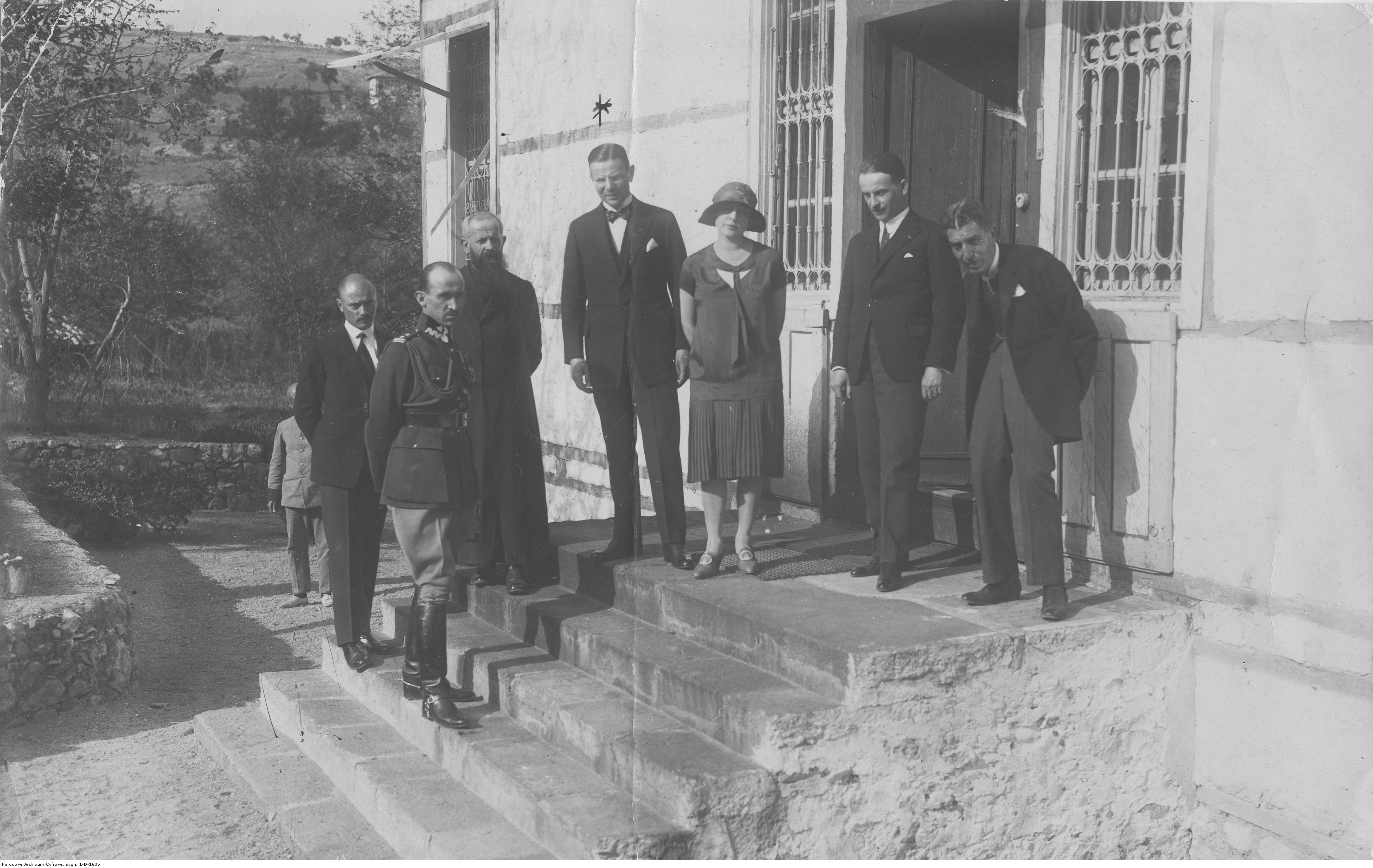 Poselstwo Polskie w Angorze. Od lewej: sekr. Buczyński, attaché wojskowy płk. Tadeusz Schaetzel, kapelan ambasady francuskiej, poseł dr Karol Bader z żoną, radca handlowy Zygmunt Vetulani i tłumacz Fazli bey.